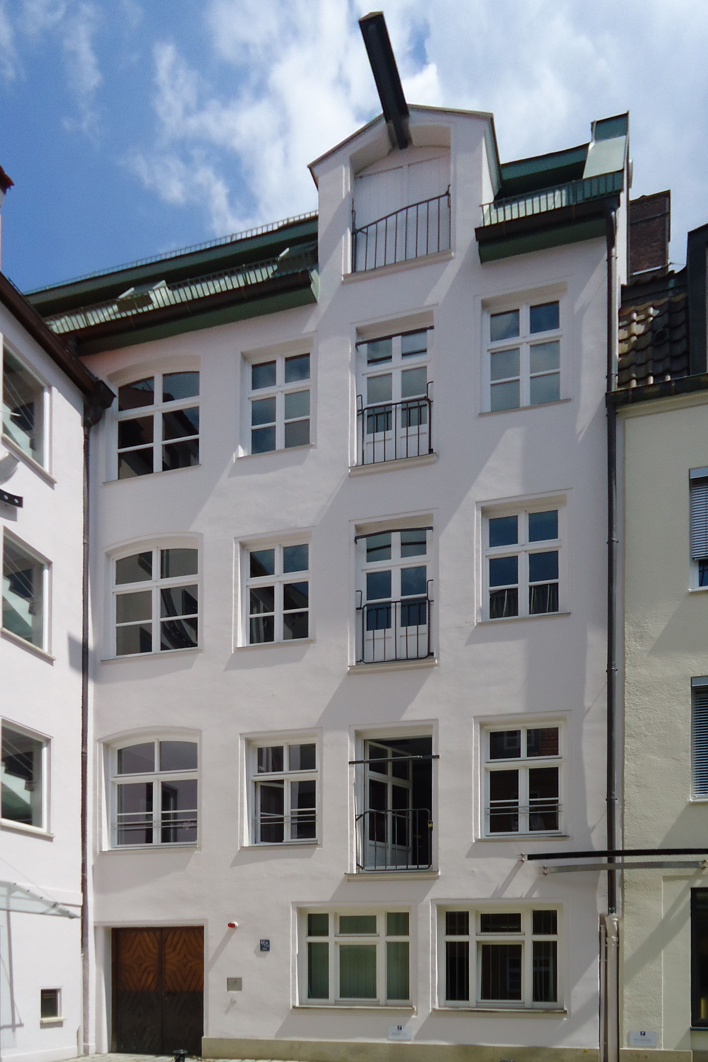 Pfladergasse 11 in Augsburg